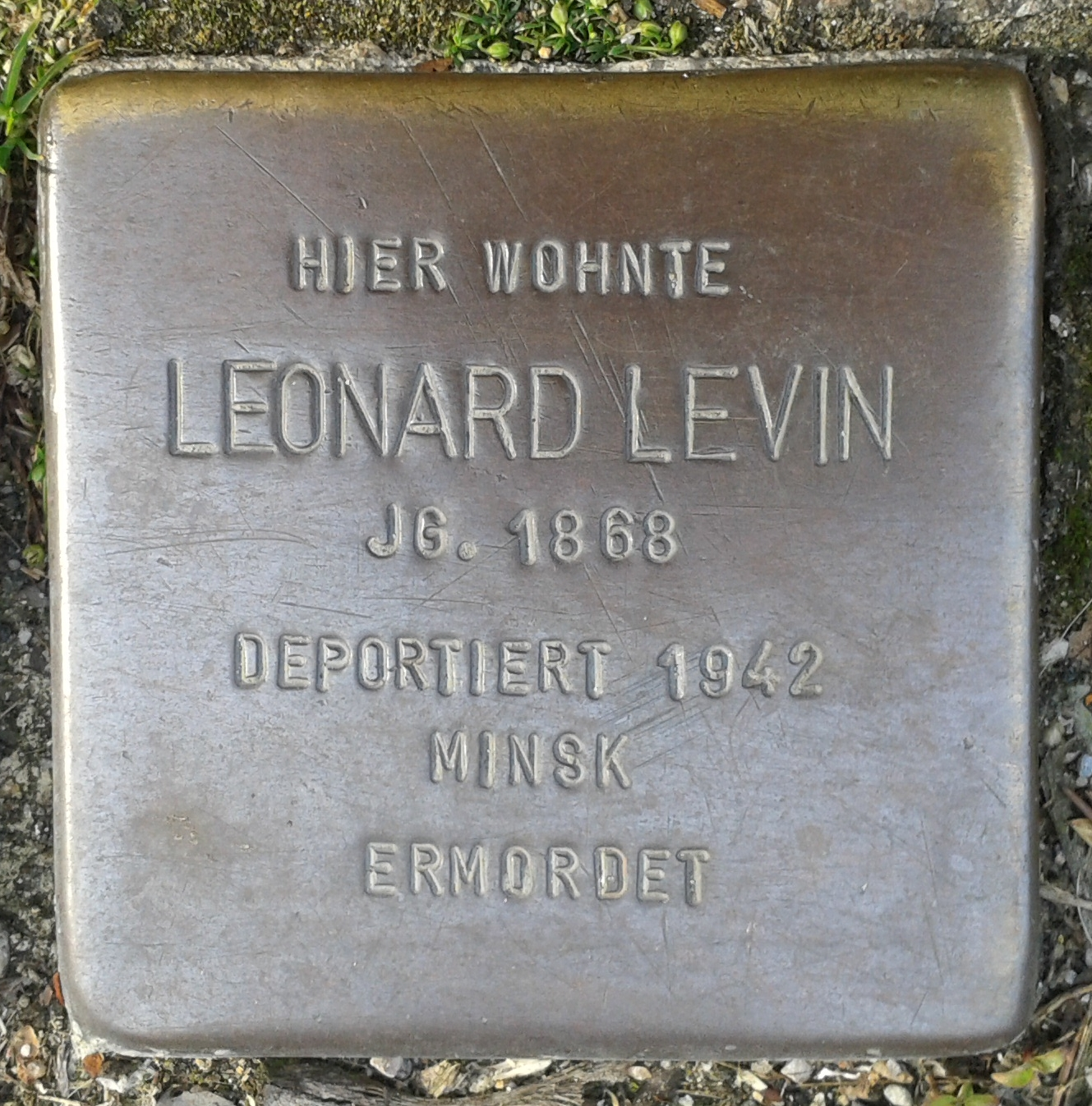 Stolperstein Selm Hauptstraße 34 Leonard Levin